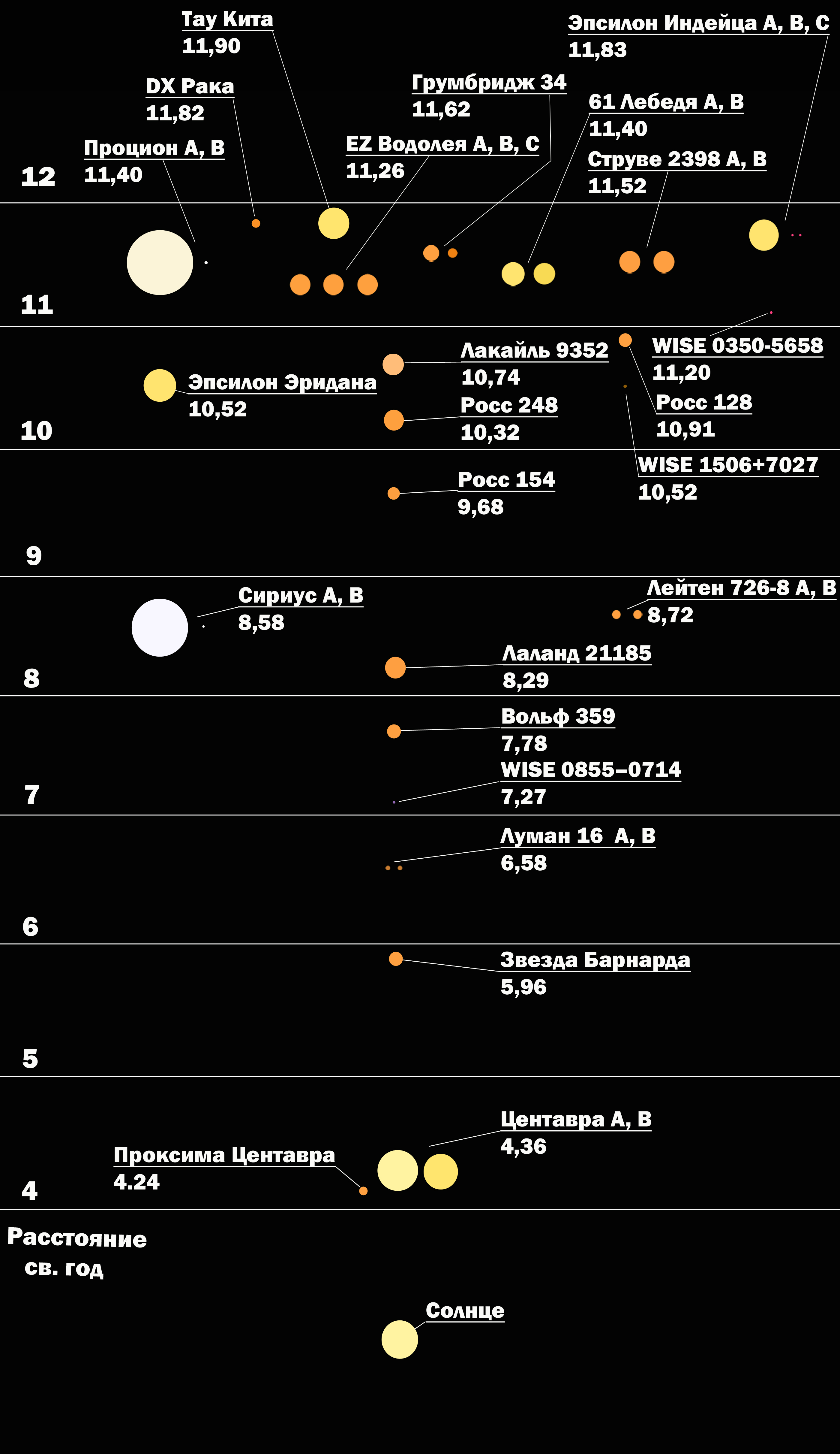 Изображение условного масштаба и размеров ближайших звезд в приделах 12 световых лет.